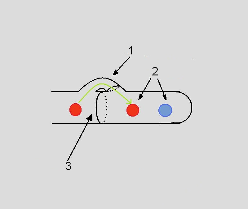 Overview of clamp connections in basidiomycete showing septa